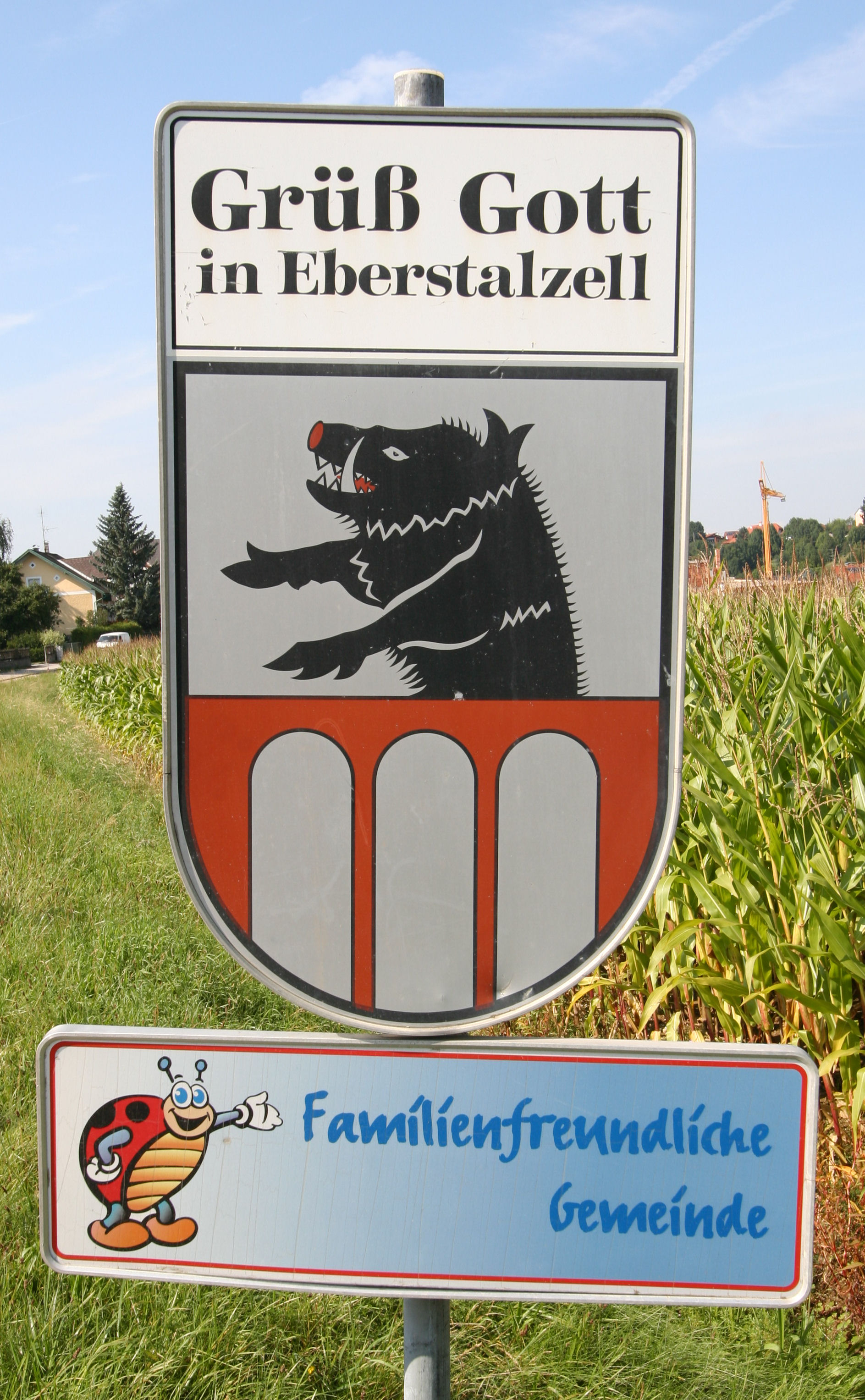 Eberstalzell, Wappen auf Begrüßungsschild